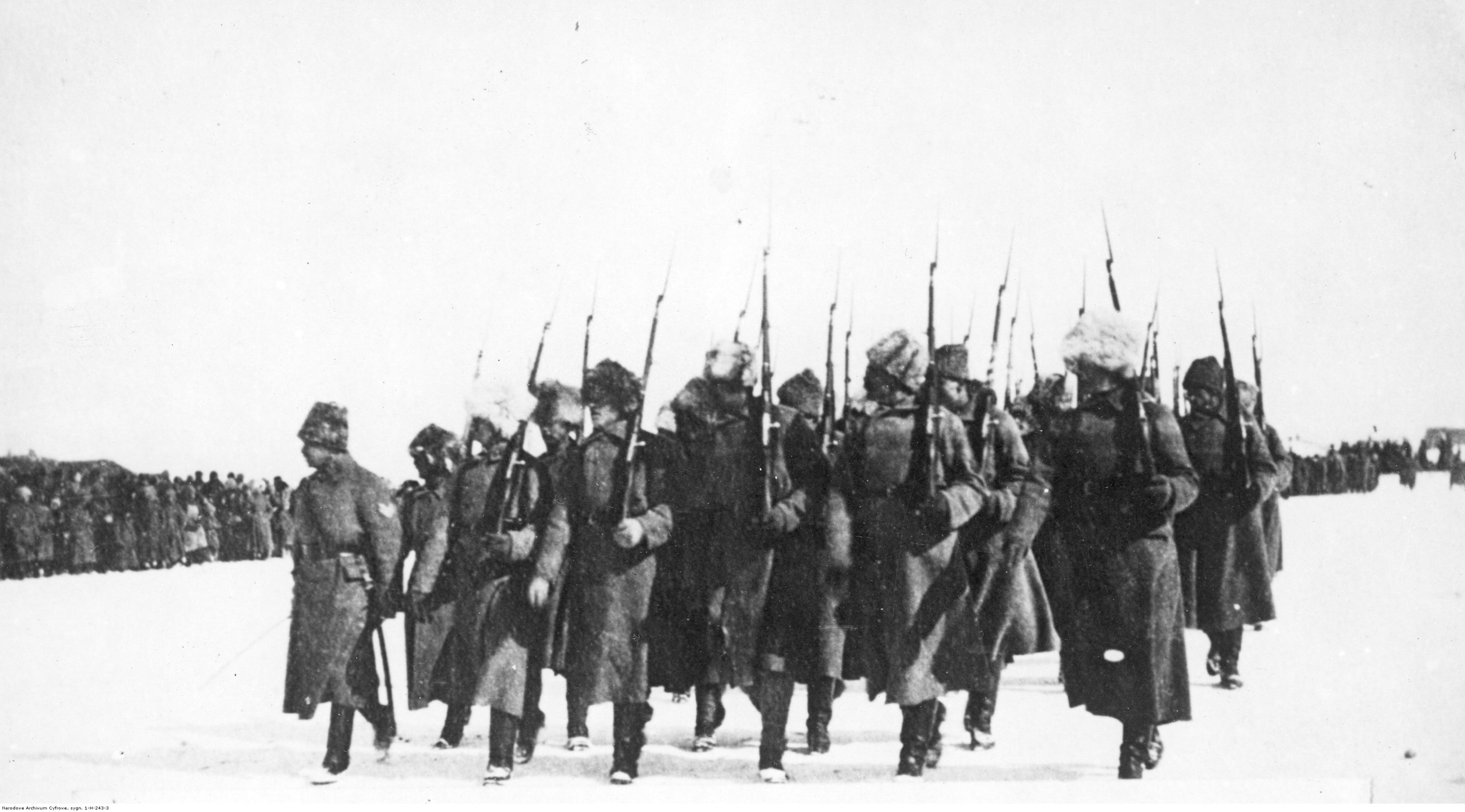 Defilada 5 Dywizji Strzelców Polskich w Nowonikołajewsku (obecnie Nowosybirsk)